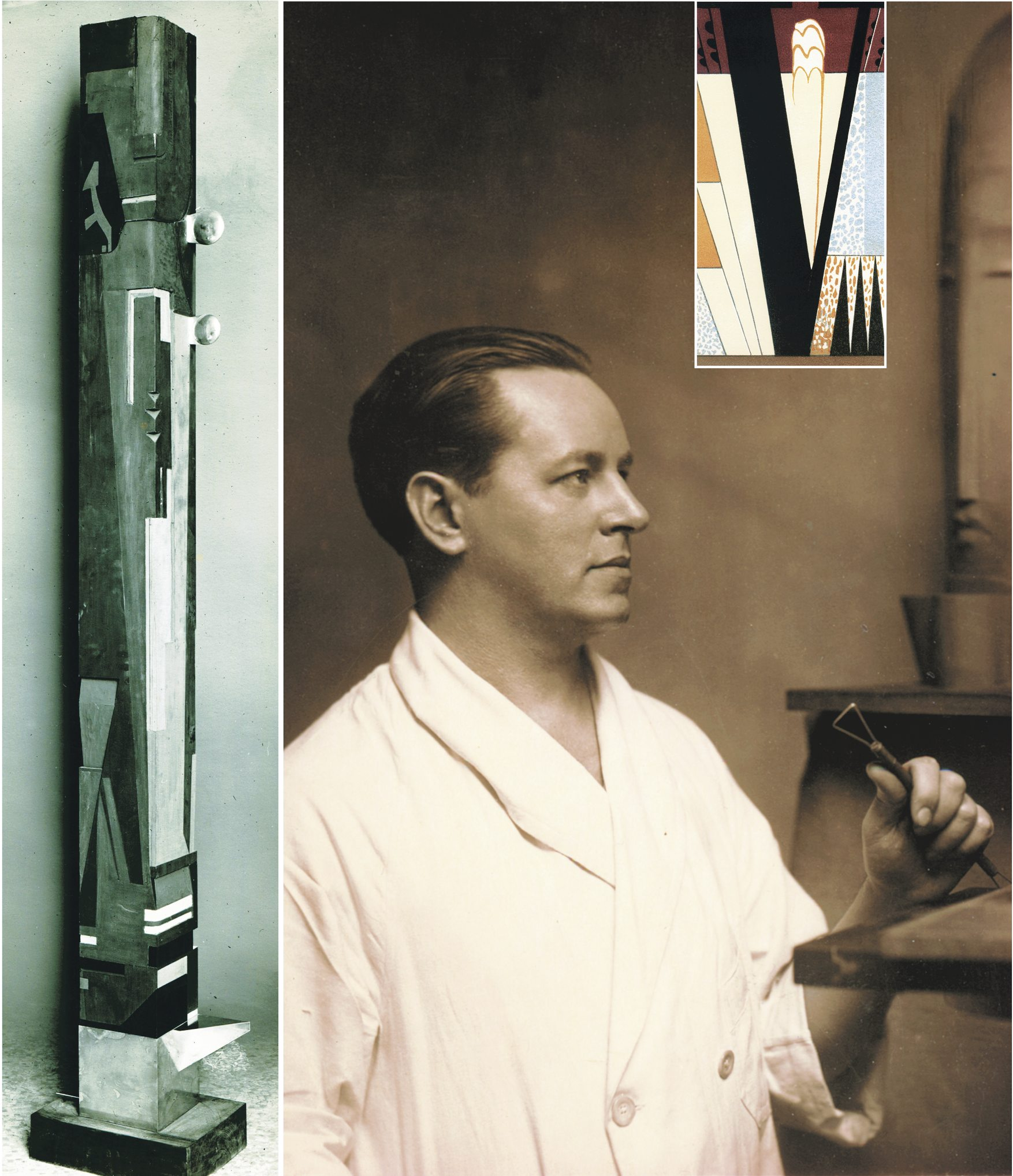 Sculpture architecturale de miklos.